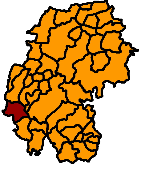 Gehlberg hervorgehoben, Ilm-Kreis